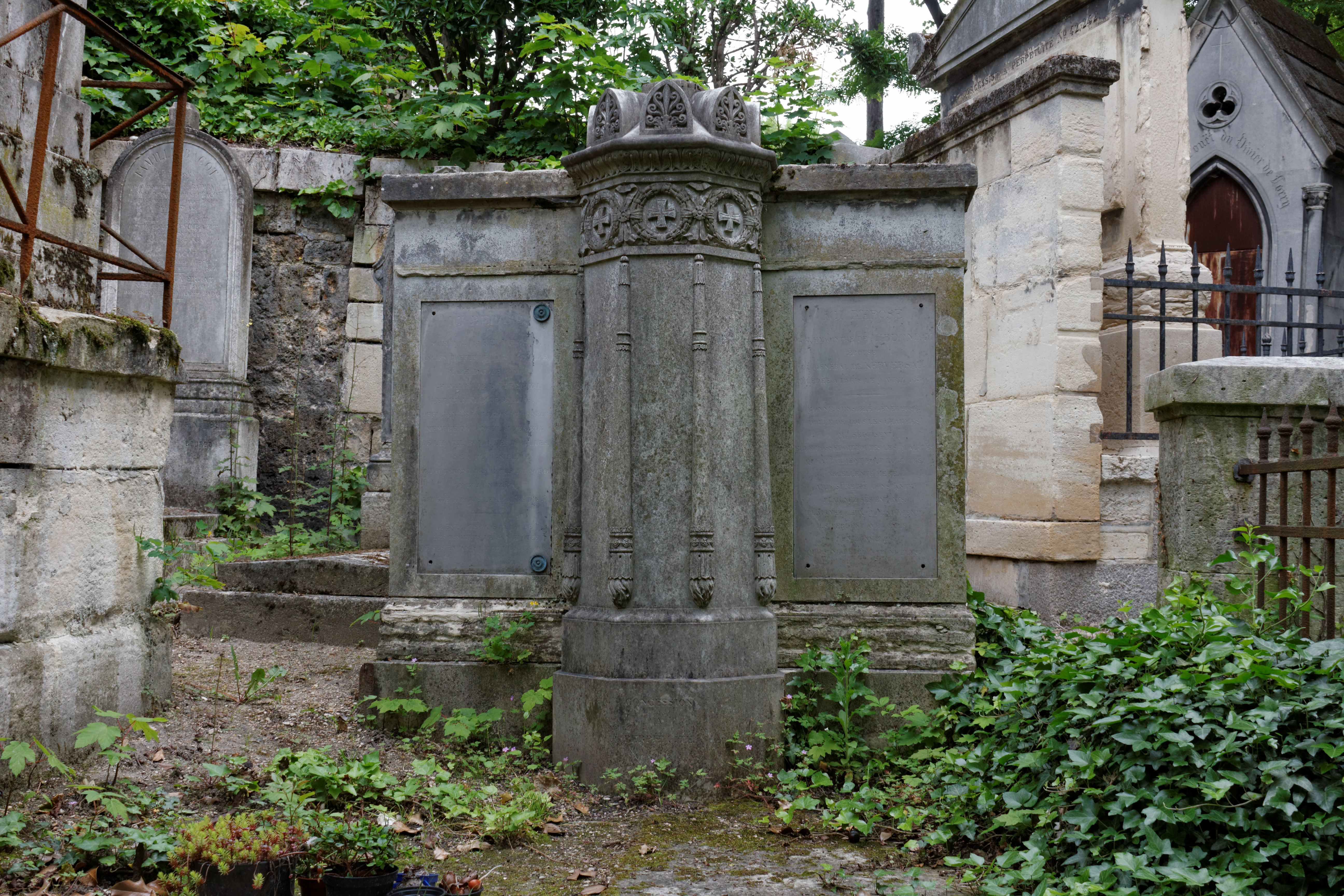 Vue d'ensemble